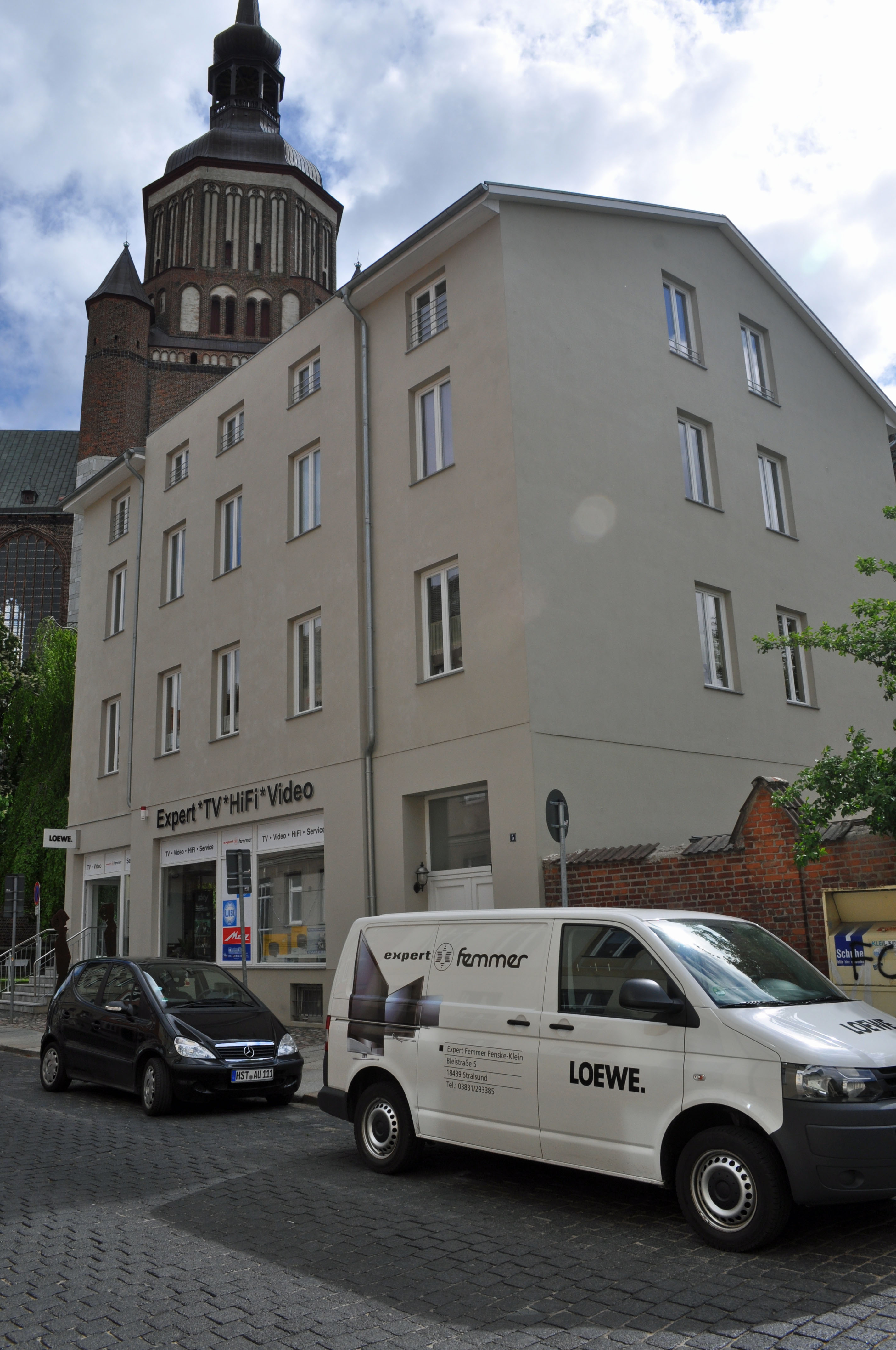 Gebäude in Stralsund, siehe Dateiname